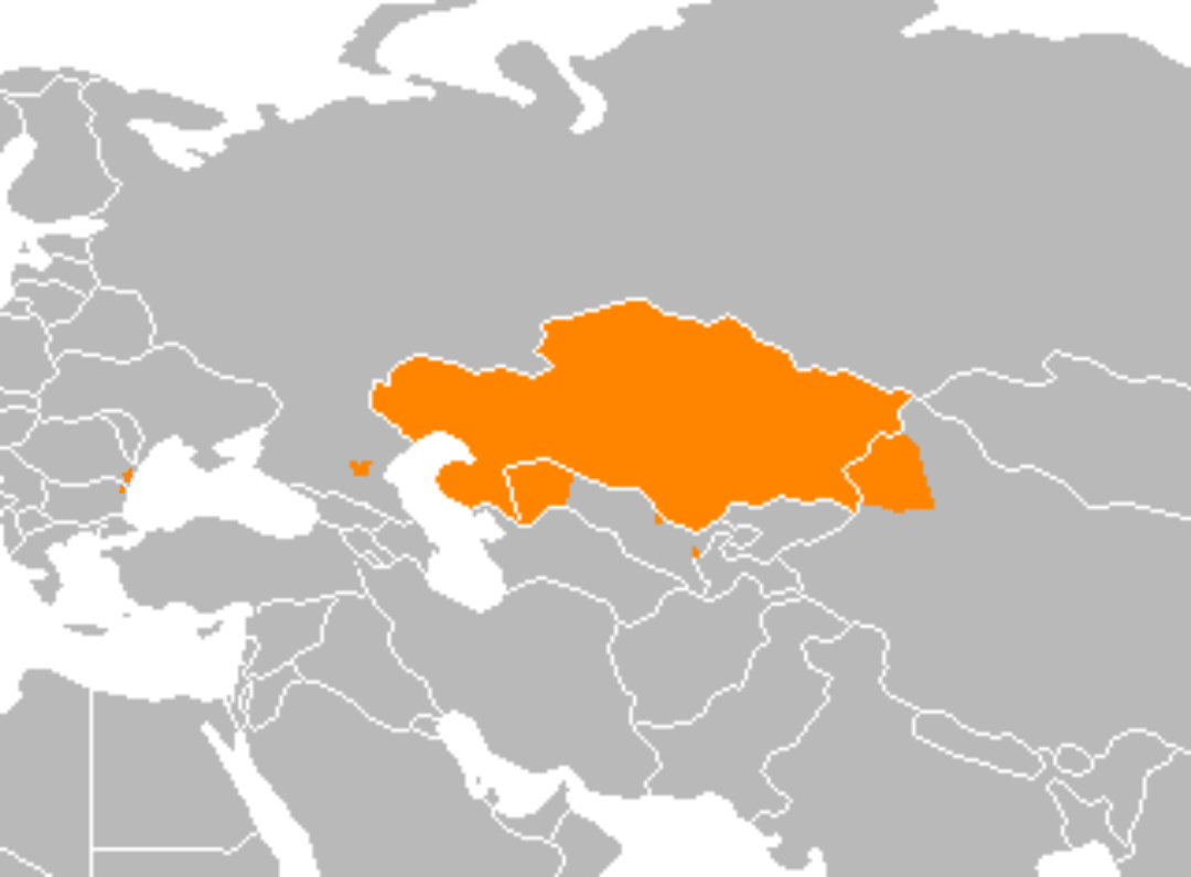 Map of kypchak-nogai languages